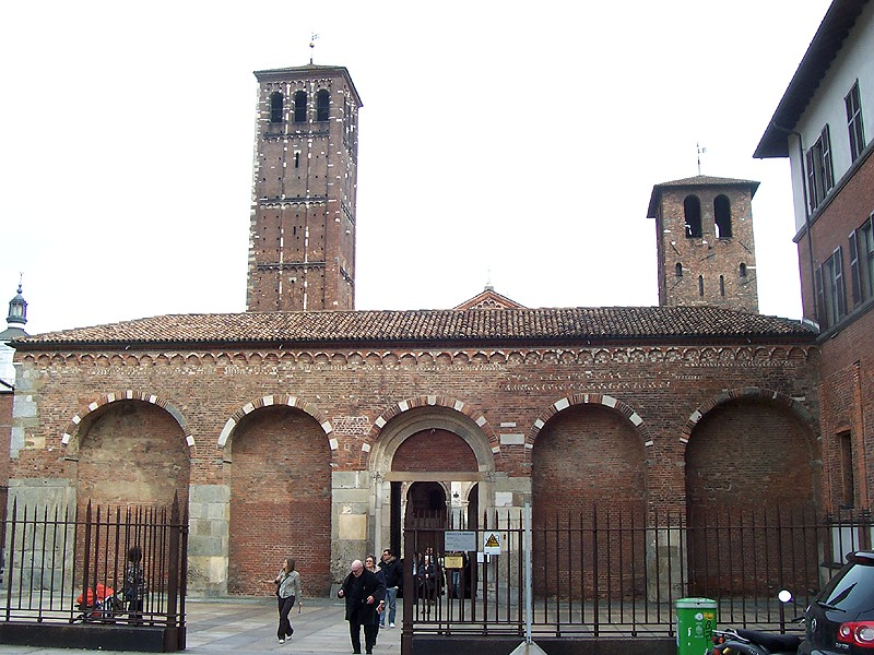 Milano - Basilica di S. Ambrogio